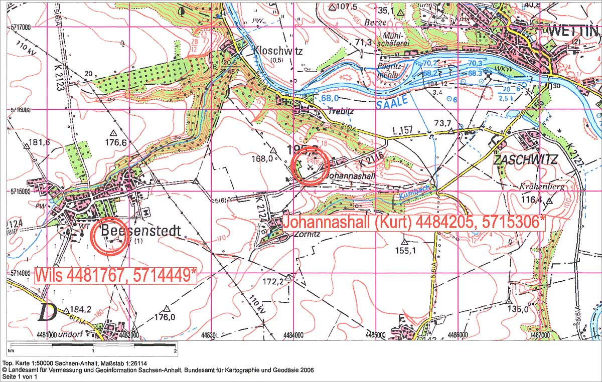 Lage der Schächte Johannashall (Kurt) und Wils mit Angabe der Koordinaten